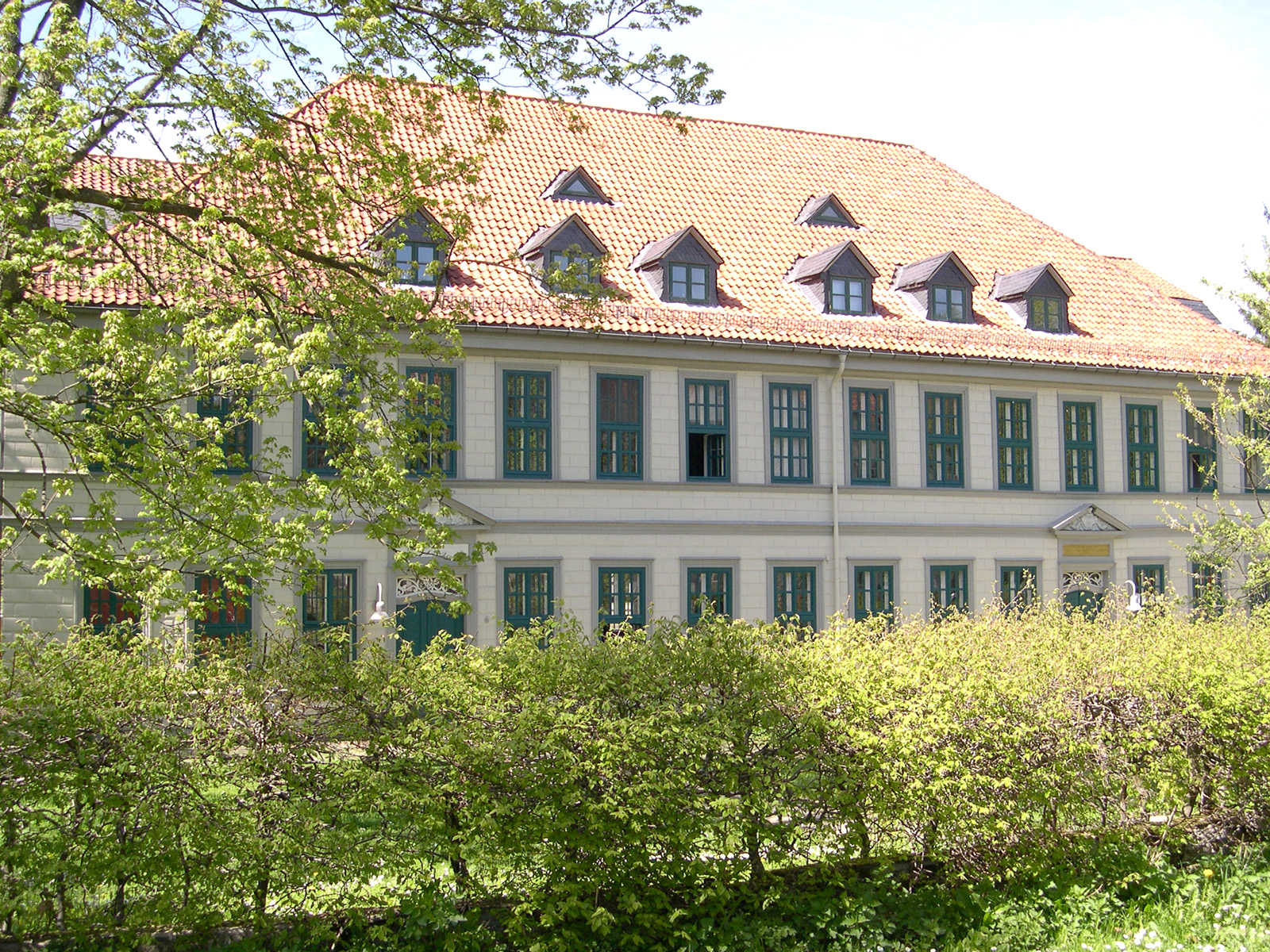 TU Clausthal - Wohneim 1